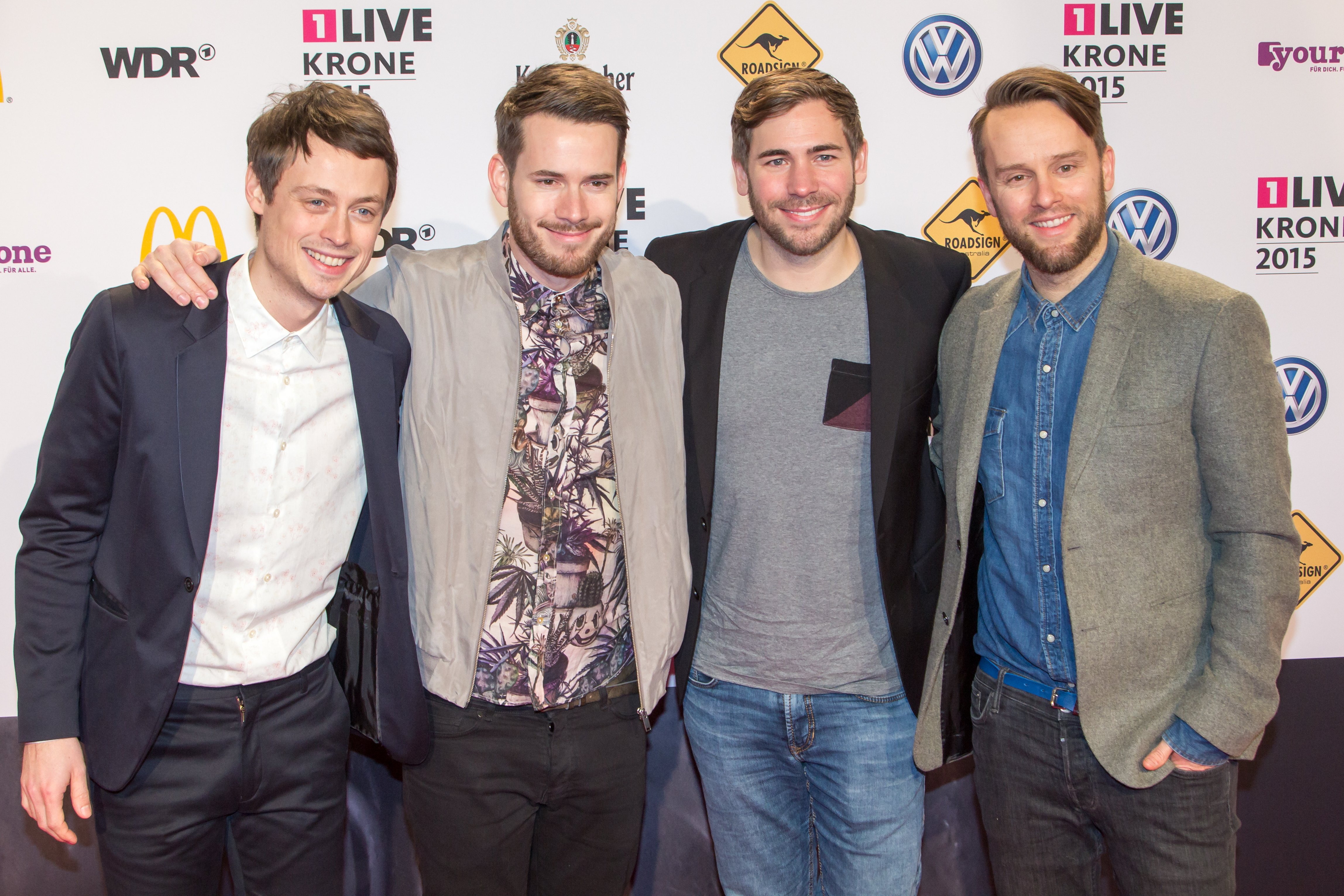 1liVE Krone 2015 - Revolverheld